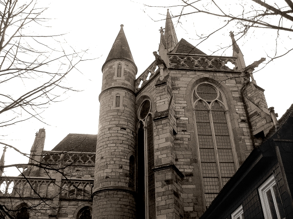 Ort: Lippstadt - Motiv: Nicolaikirche - Aufnahmedatum: April 2006 - Kamera: Fuji FinePix S5500 + Polfilter - Digitale Bildbearbeitung: Umwandlung in Schwarzweiss - Auflösung: 600x450 Pixel - Fotograf: SunSonic